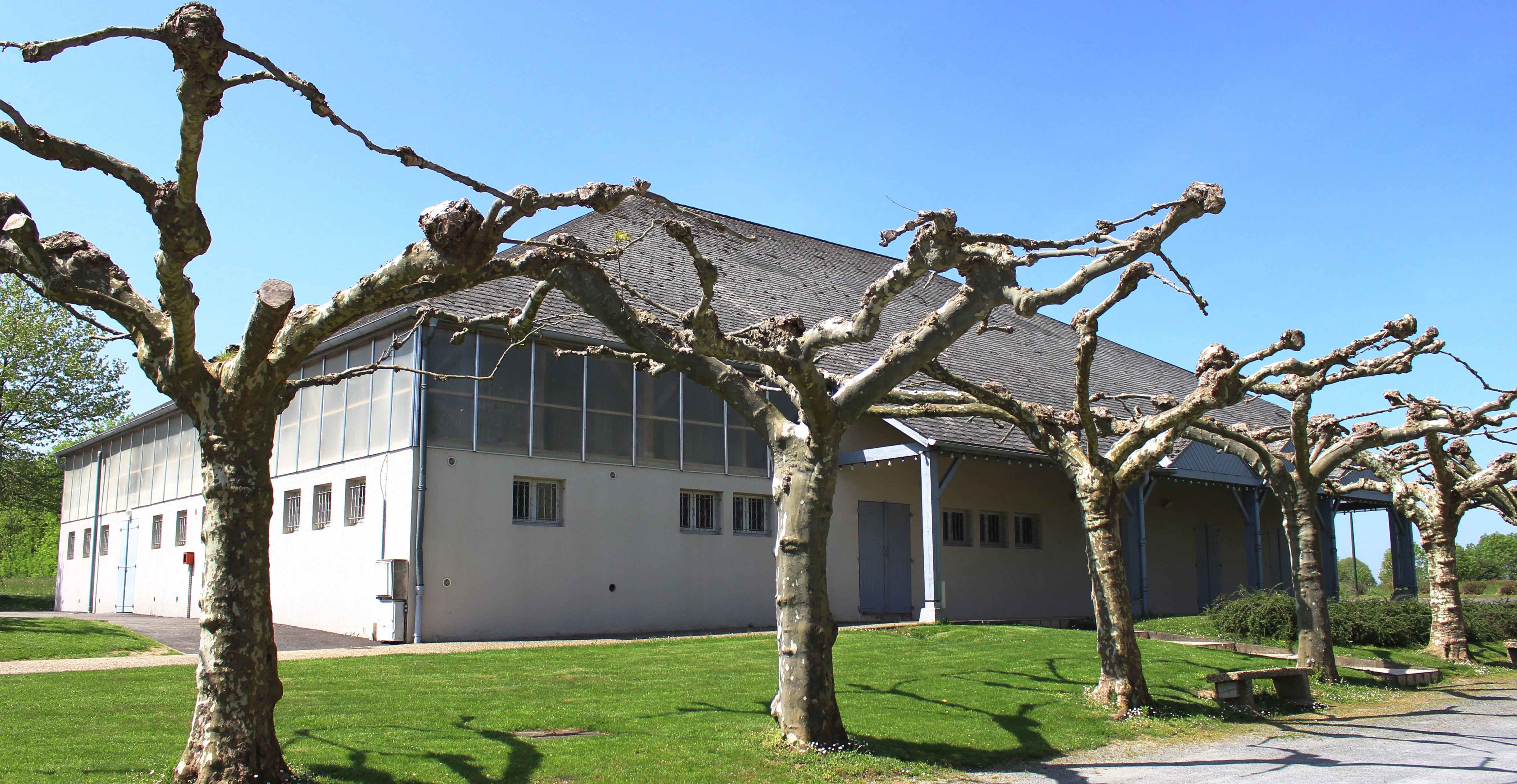 Salle des fêtes de Gardères (Hautes-Pyrénées)